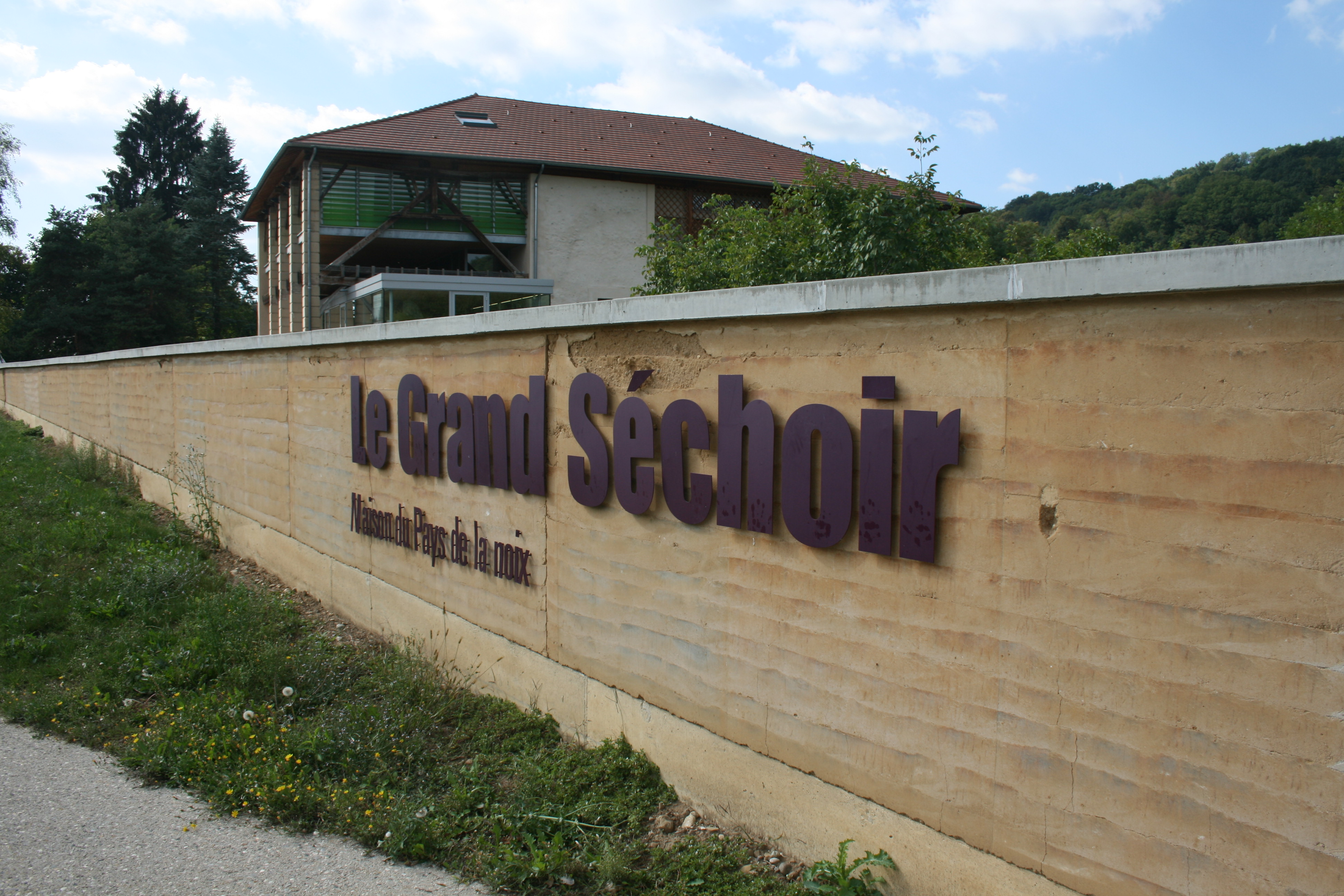 Le grand séchoir Vinay Isère, Maison du pays de la noix